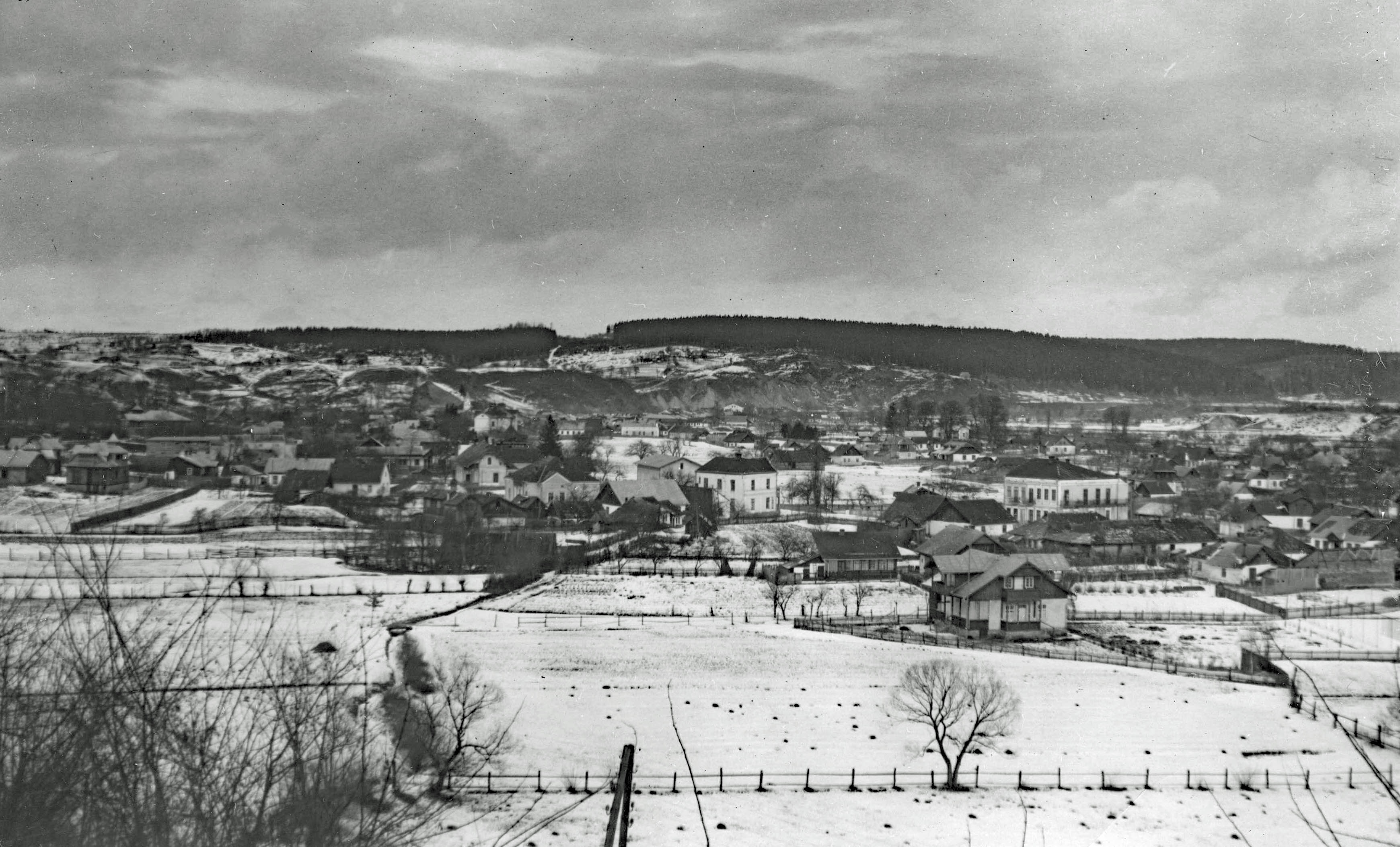 Delatyn, uzdrowisko w woj. stanisławowskim, około 1918